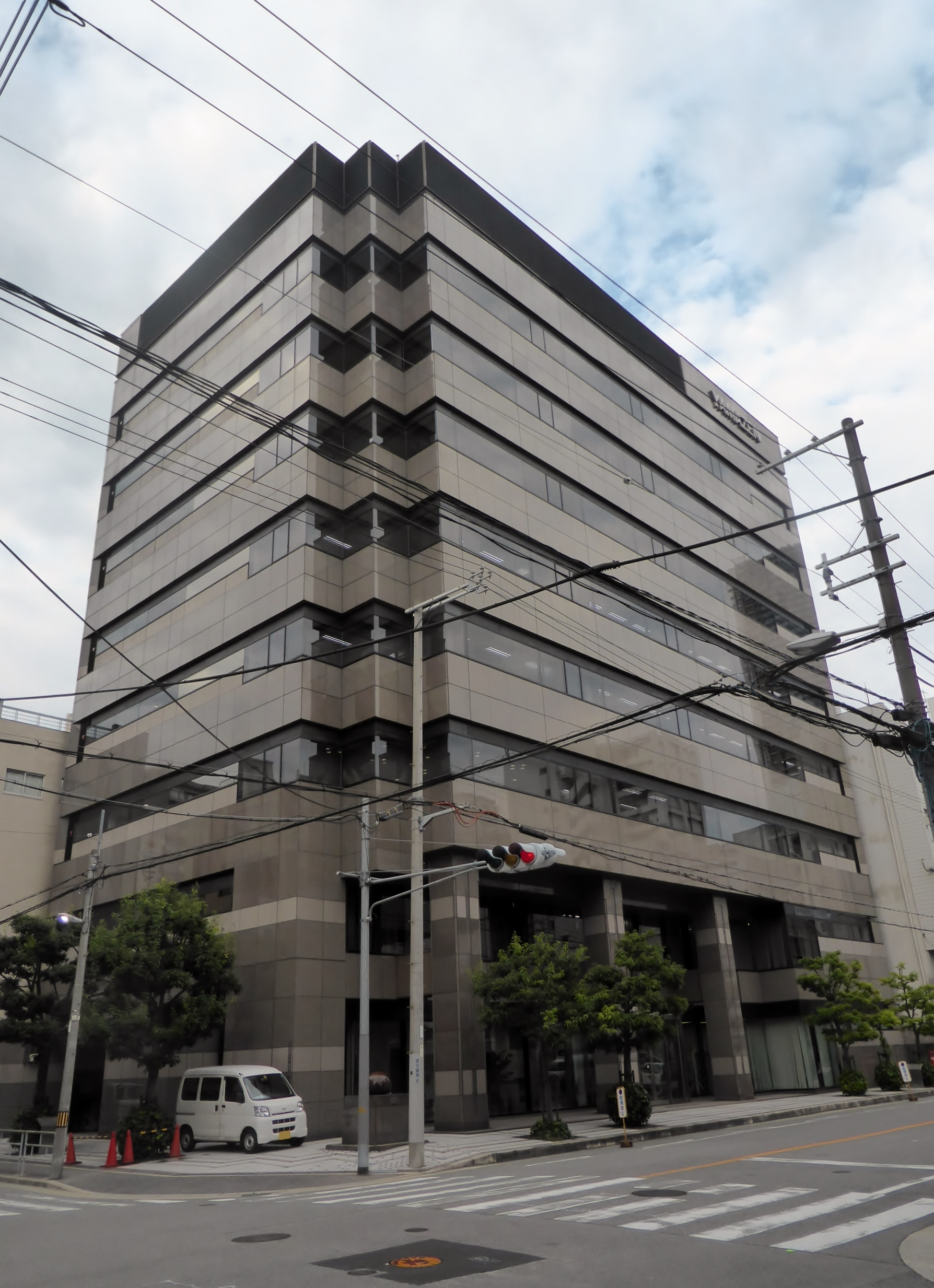 株式会社山善本社を撮影。